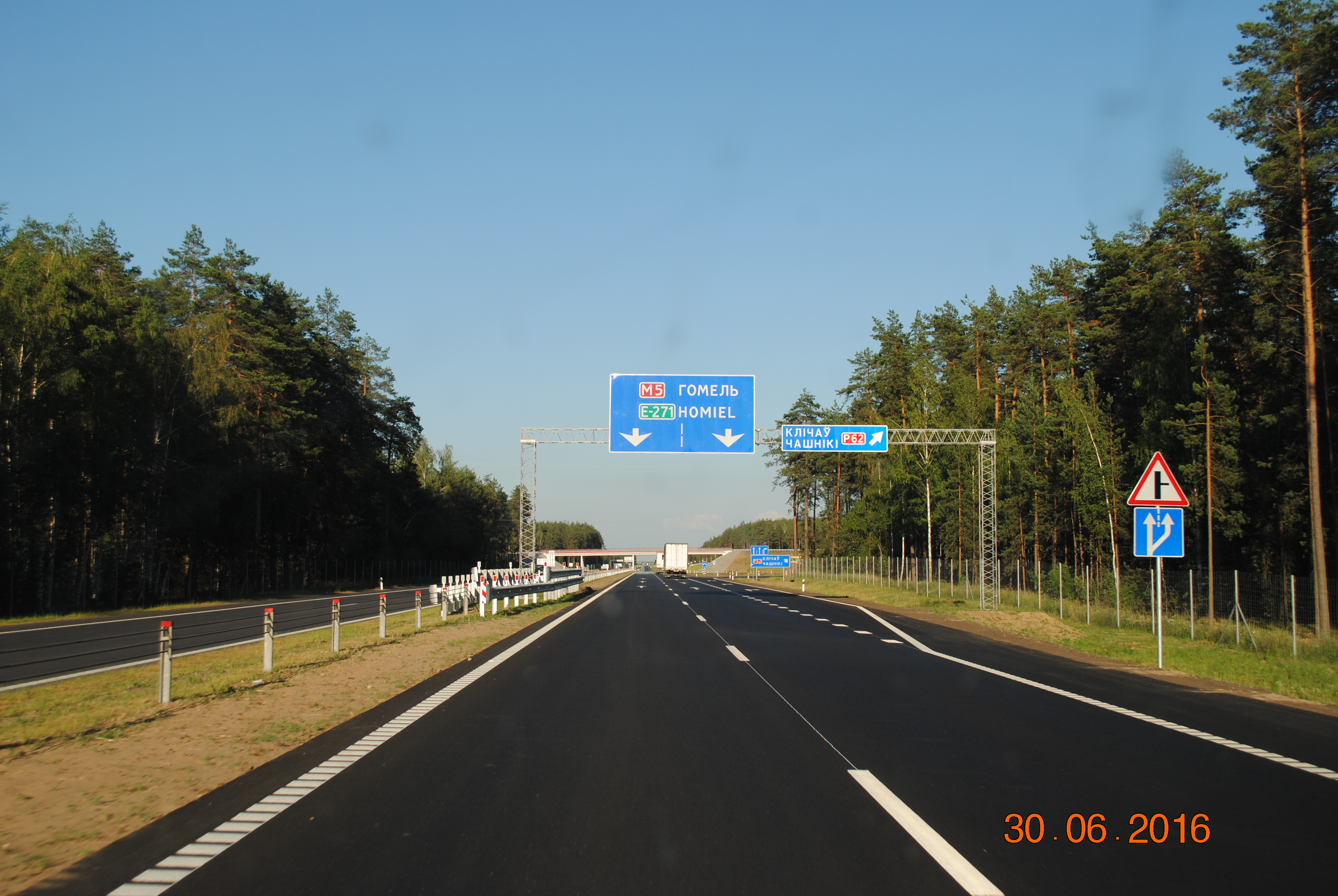 Белорусская автодорога М5 на участке объезда г. Бобруйска